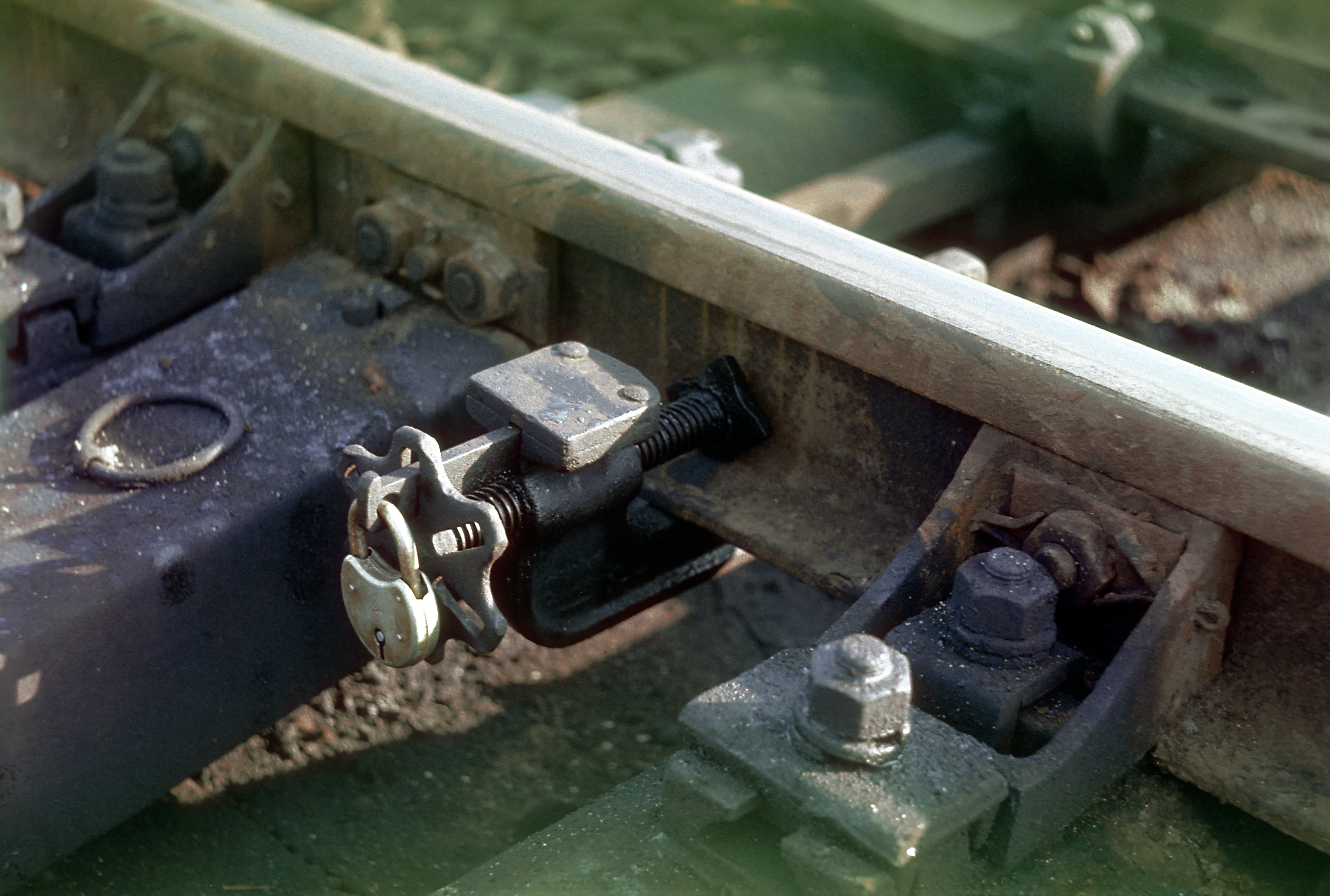 Normalerweise gehört auf die Zungensperre ein festeingebautes Schloss. So funktioniert es allerdings auch. Die Abstützscheibe für den Schienenfuß hat man übersehen – und im Regelfall bei intaktem Spitzenverschluss ist die abliegende Zunge zu verschließen.